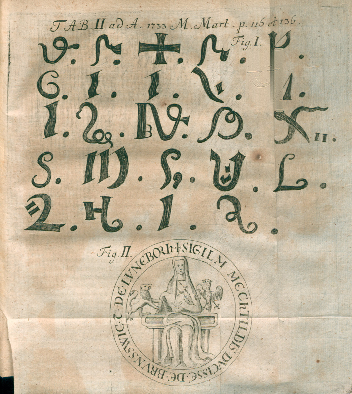 Illustration